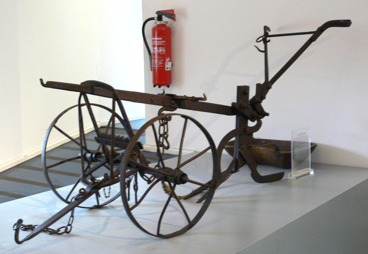 Pommritzer Rodepflug zur Zuckerrübenernte, nach 1920; Zucker-Museum, Berlin